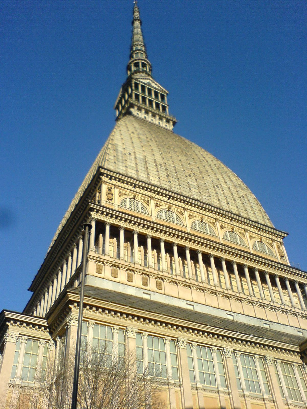 Torino, Italia